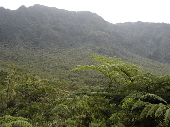 Forêt primaire de Bébour (Ile de la Réunion) (Photo personnelle)